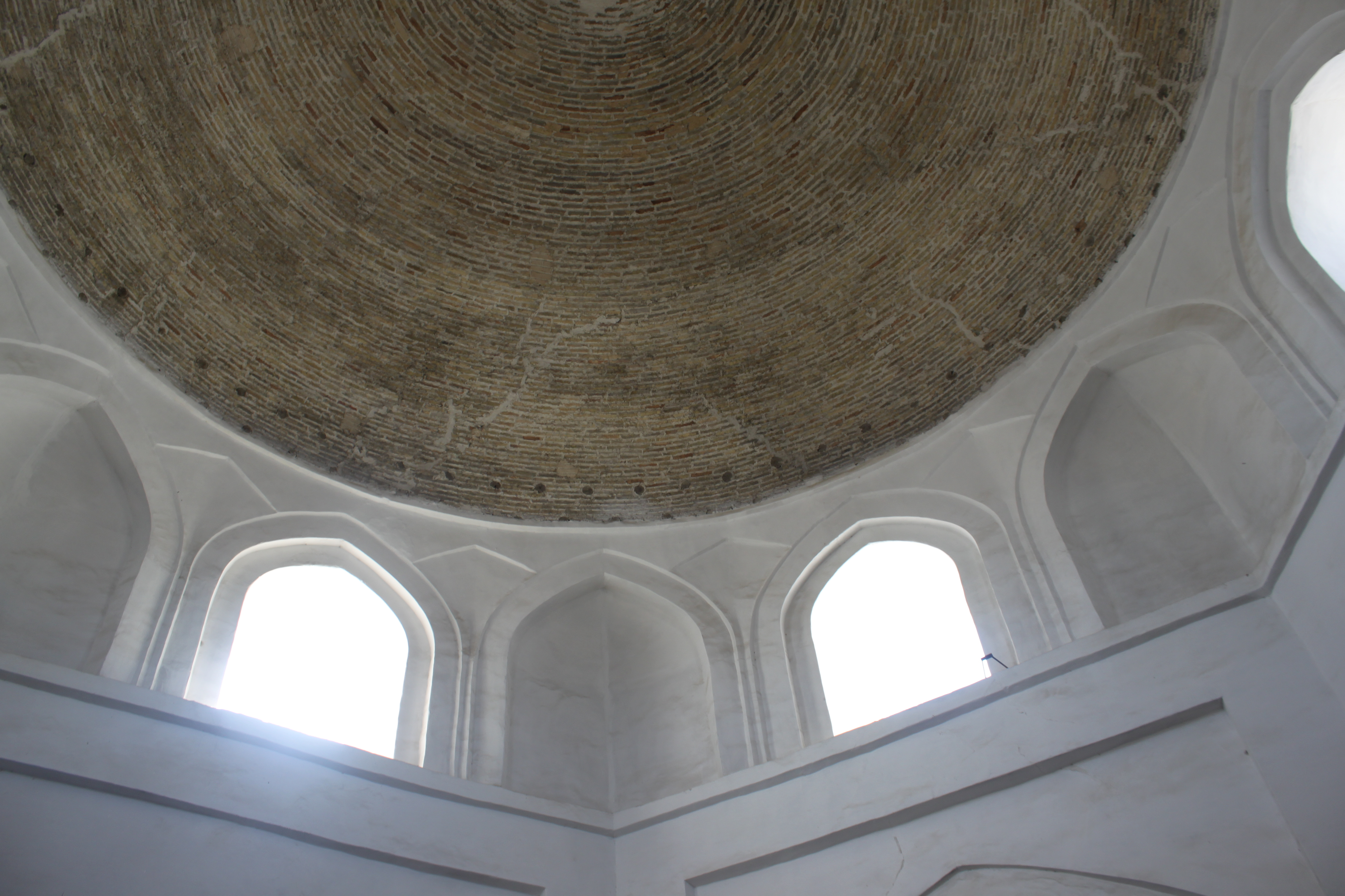 Intérieur du Tak-i -Tilpak Furushon à Boukhara